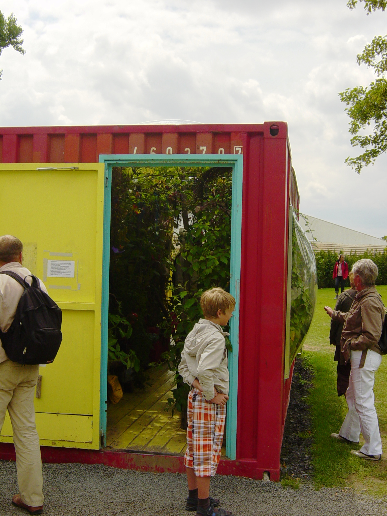 Installation von Gerda Steiner und Jörg Lenzlinger anlässlich der BUGA 2011 in Koblenz: Les envahisseurs! (Container gefüllt mit Pflanzen 2004; Leihgabe aus Genf)